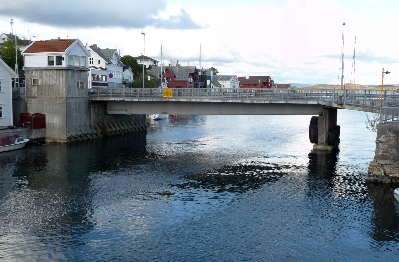 Strømsund bru, Kopervik 05.2010